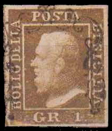 Почтовая марка Сицилийского королевства, погашенная П-образным штемпелем